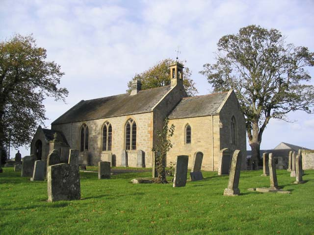 Parish kirk, Ednam